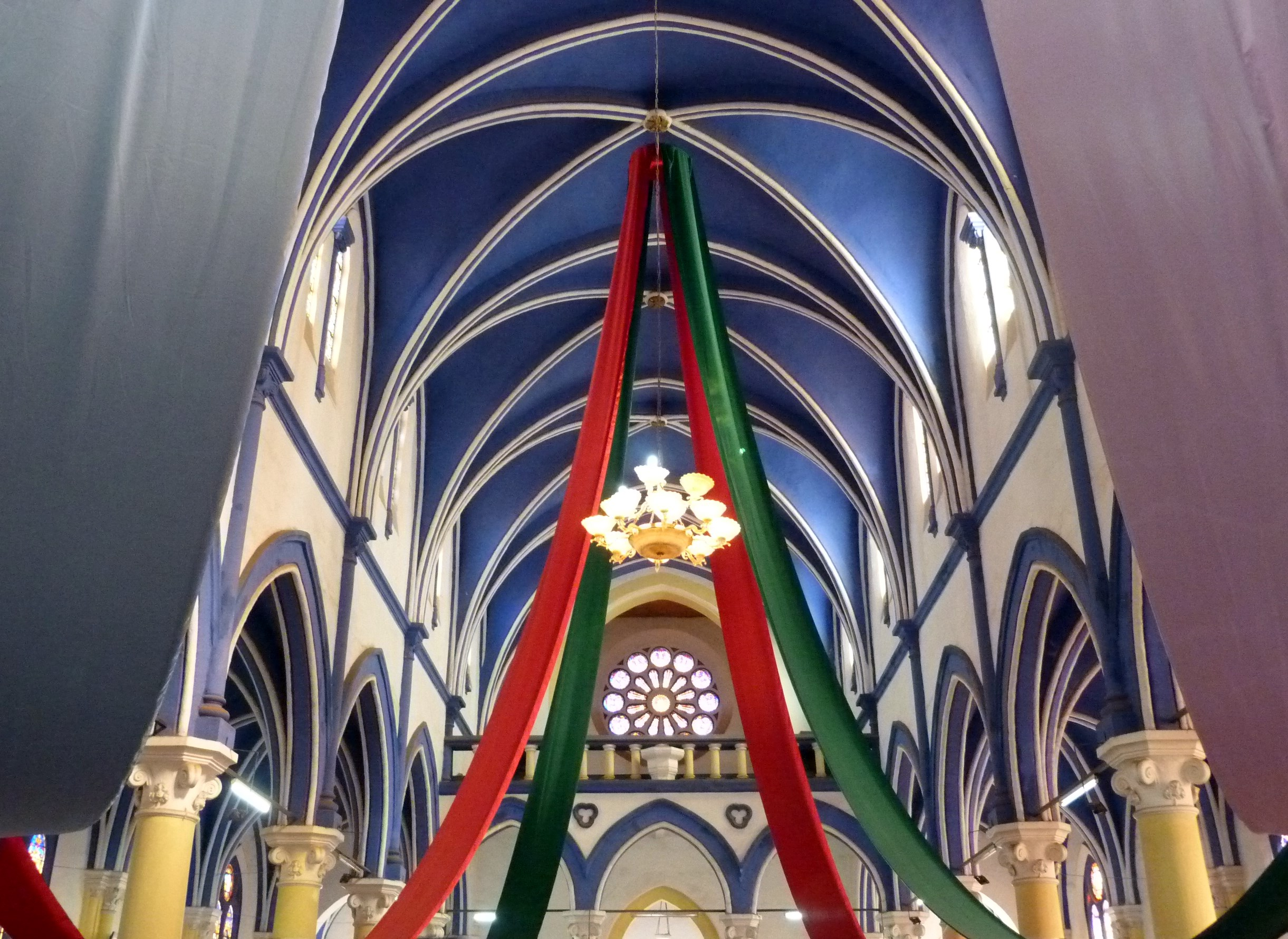 Cathédrale Notre-Dame de la Salette, Antsirabe, Madagascar (intérieur).